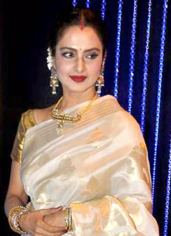 Rekha at Rakesh Roshan's birthday bash